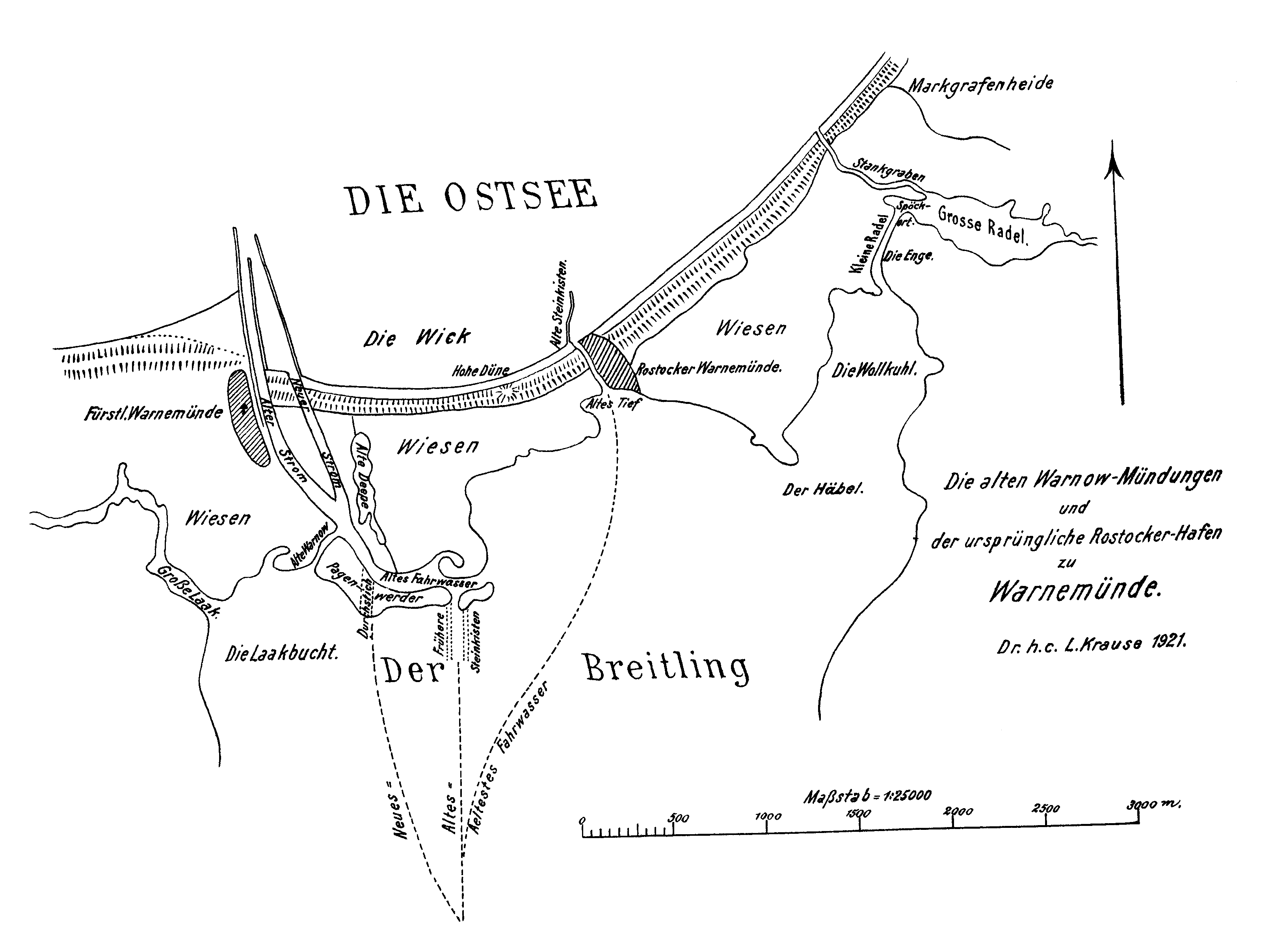 Karthografische Skizze vom historischen Zustand des Alten Stroms in Rostock